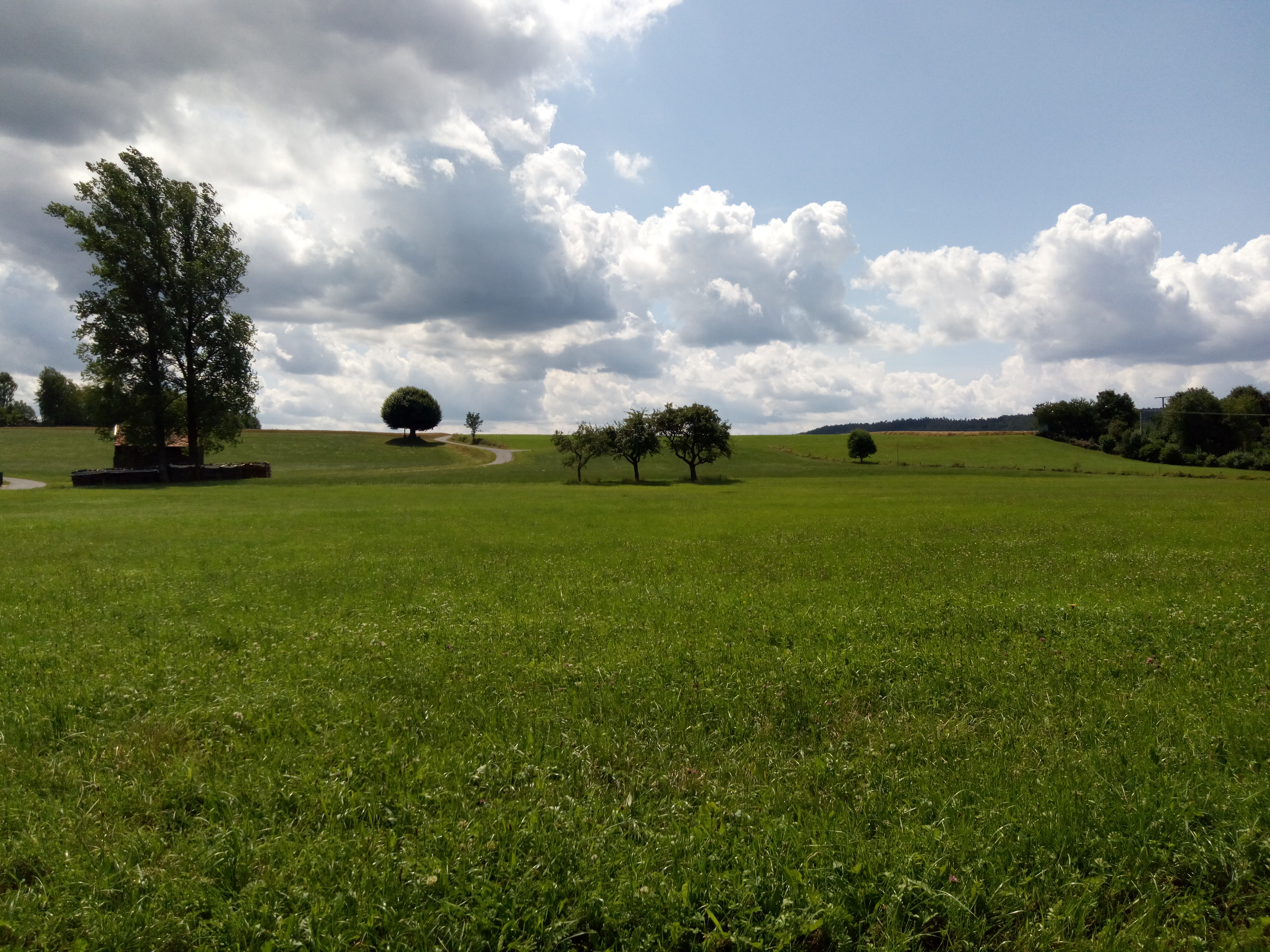 Landschaft um Lütter, Blick zum ,,Lütterbaum" mit Bildstock aus dem 19 Jhd. .